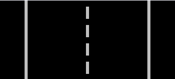 superstrada